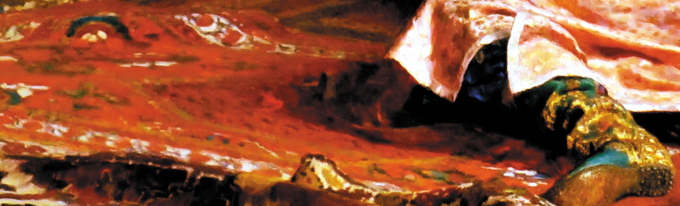 Détail de l'oeuvre Ivan le terrible et son fils Ivan - partie inférieure du tableau, bottes et pantalons du tsarévitch, tapis